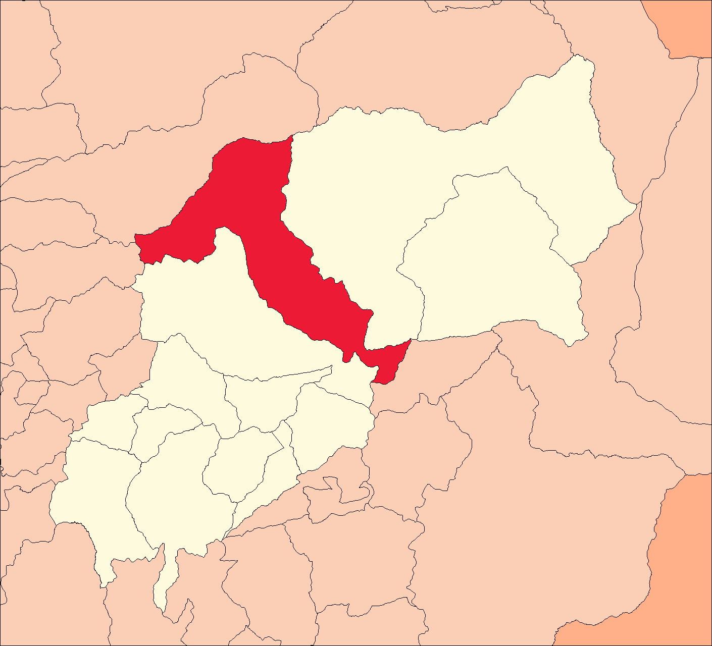 Área del distrito de Churumbamba.